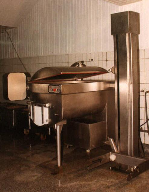 Maszyna w przemyśle mięsnym. autor W. Grabowski